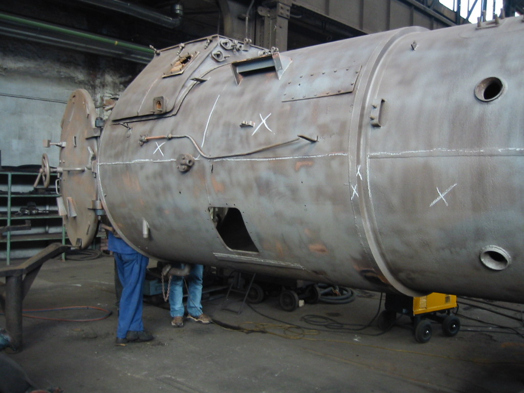 Rauchkammer am Kessel 39E